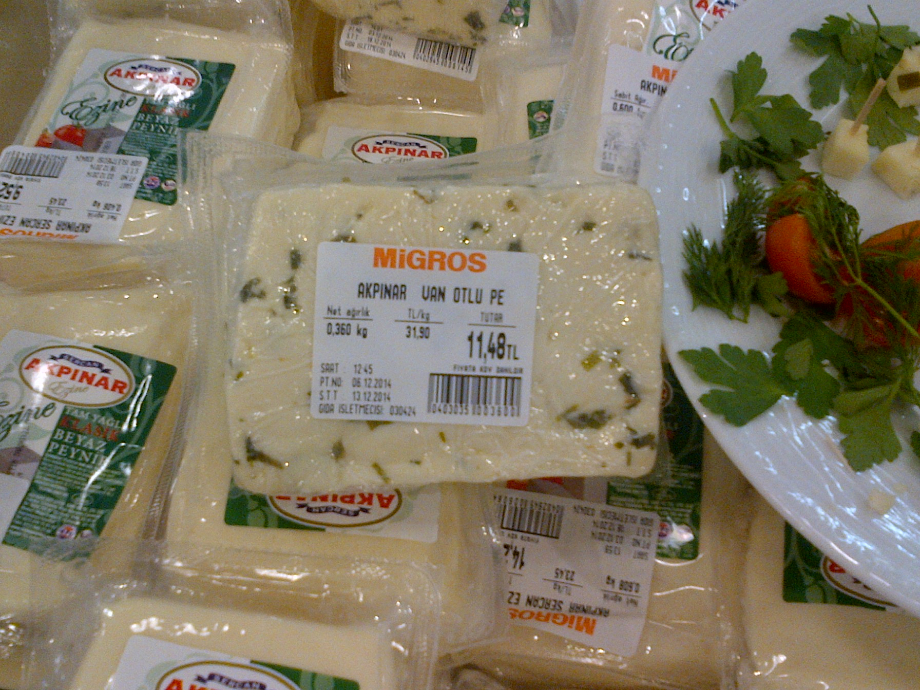 Van otlu peyniri, Herb cheese of Van, Herbal cheese from Turkey, Queso con Hierbas, en el mostrador de un supermercado de Ankara, Turquia.